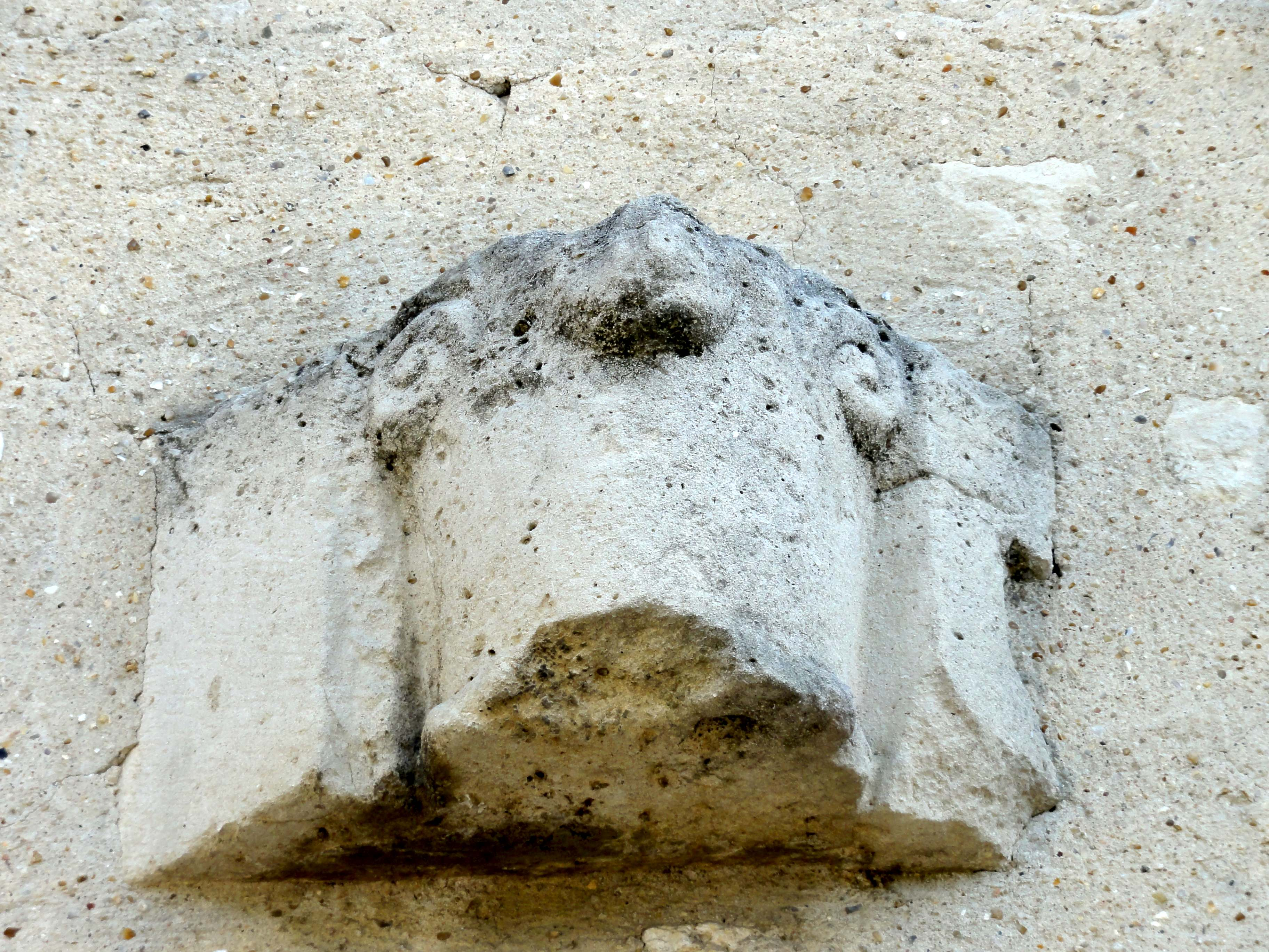 Bas-côté sud, chapiteau encastré dans le mur.